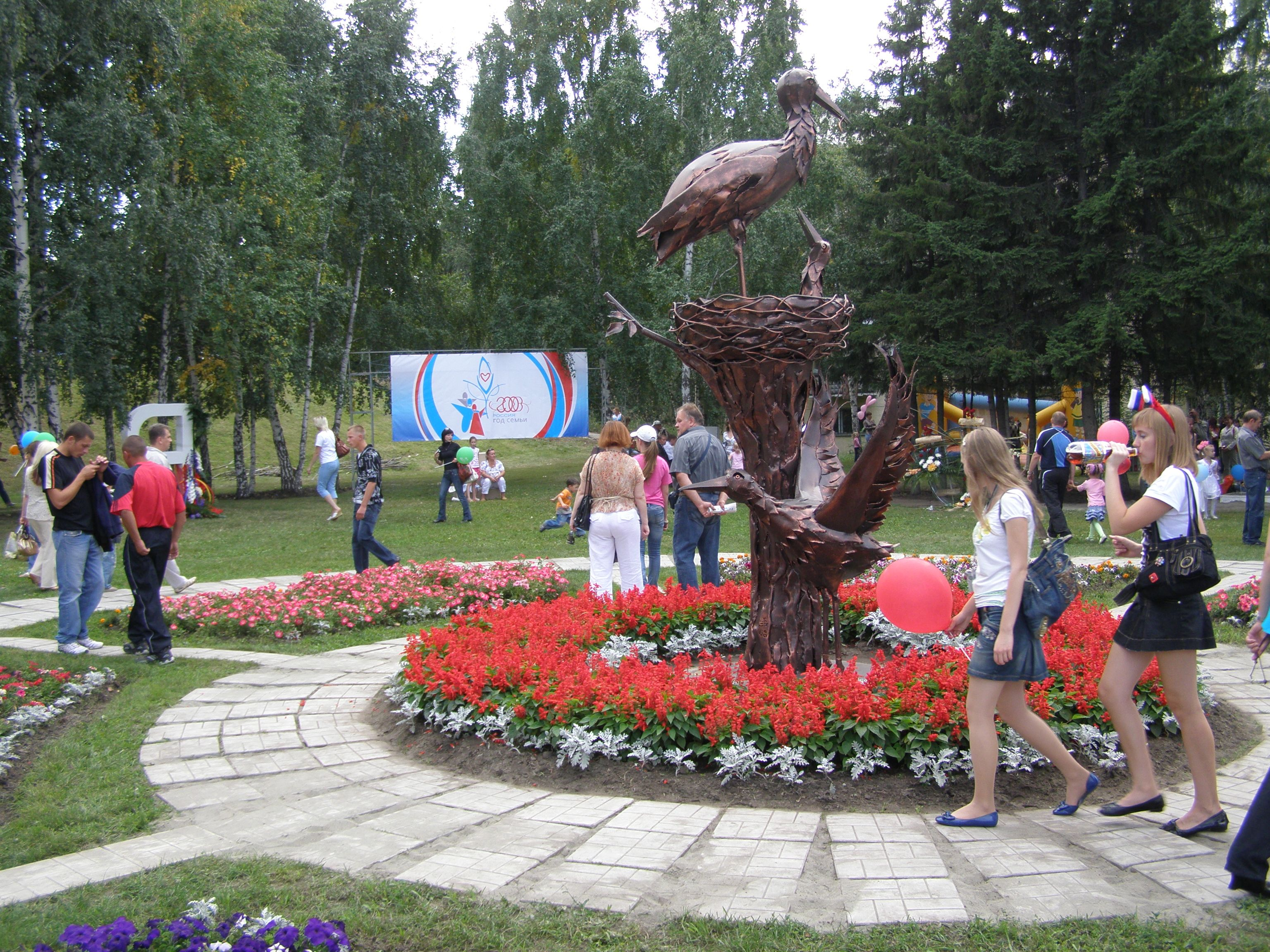 Скульптура аистов (символ семьи) в сквере на пл. Сахарова